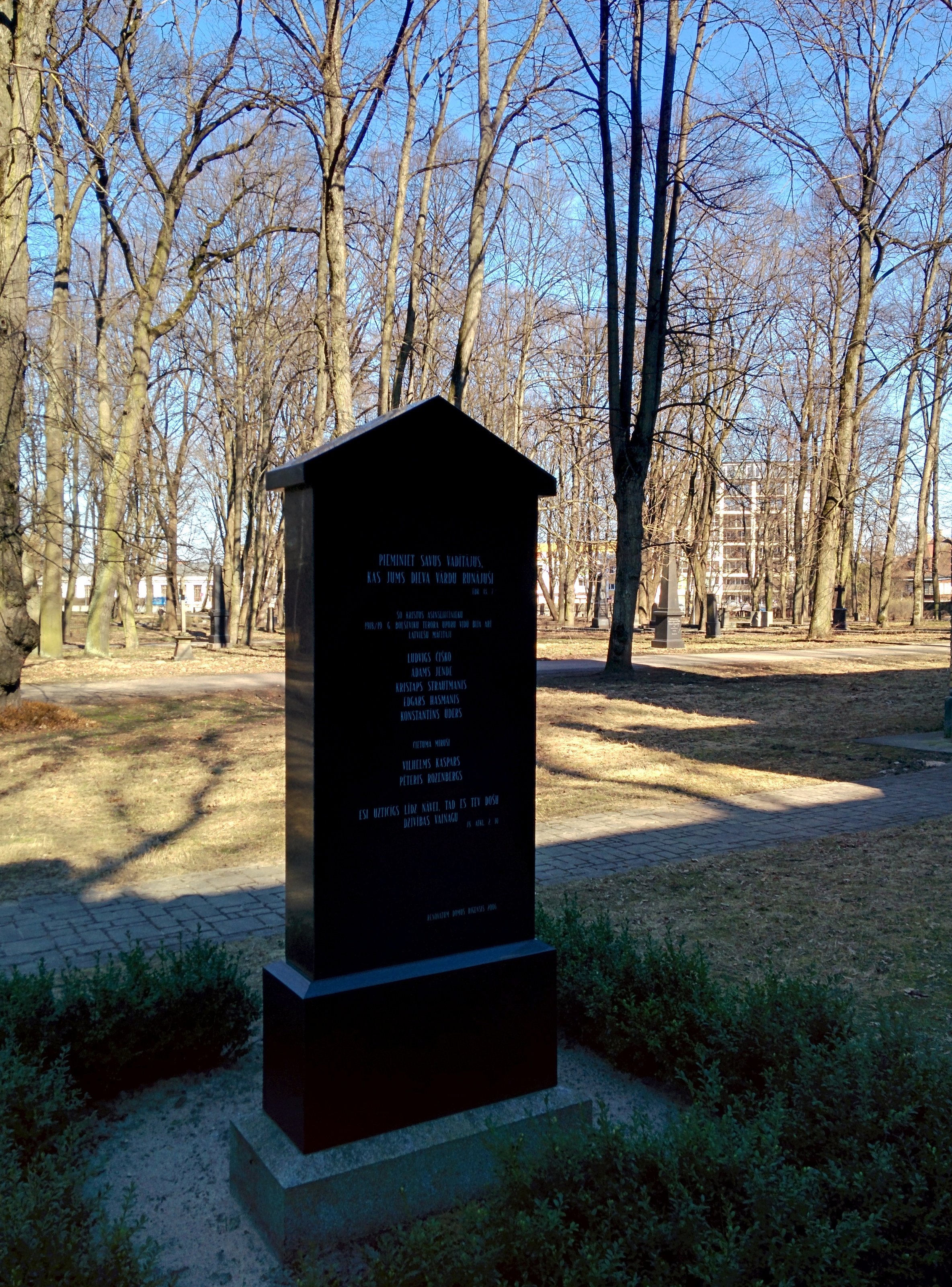 Gedenkstein für ermordete Pfarrer während der Zeit der lettischen SSR 1918-1919. Rückseite in lettischer Schrift.